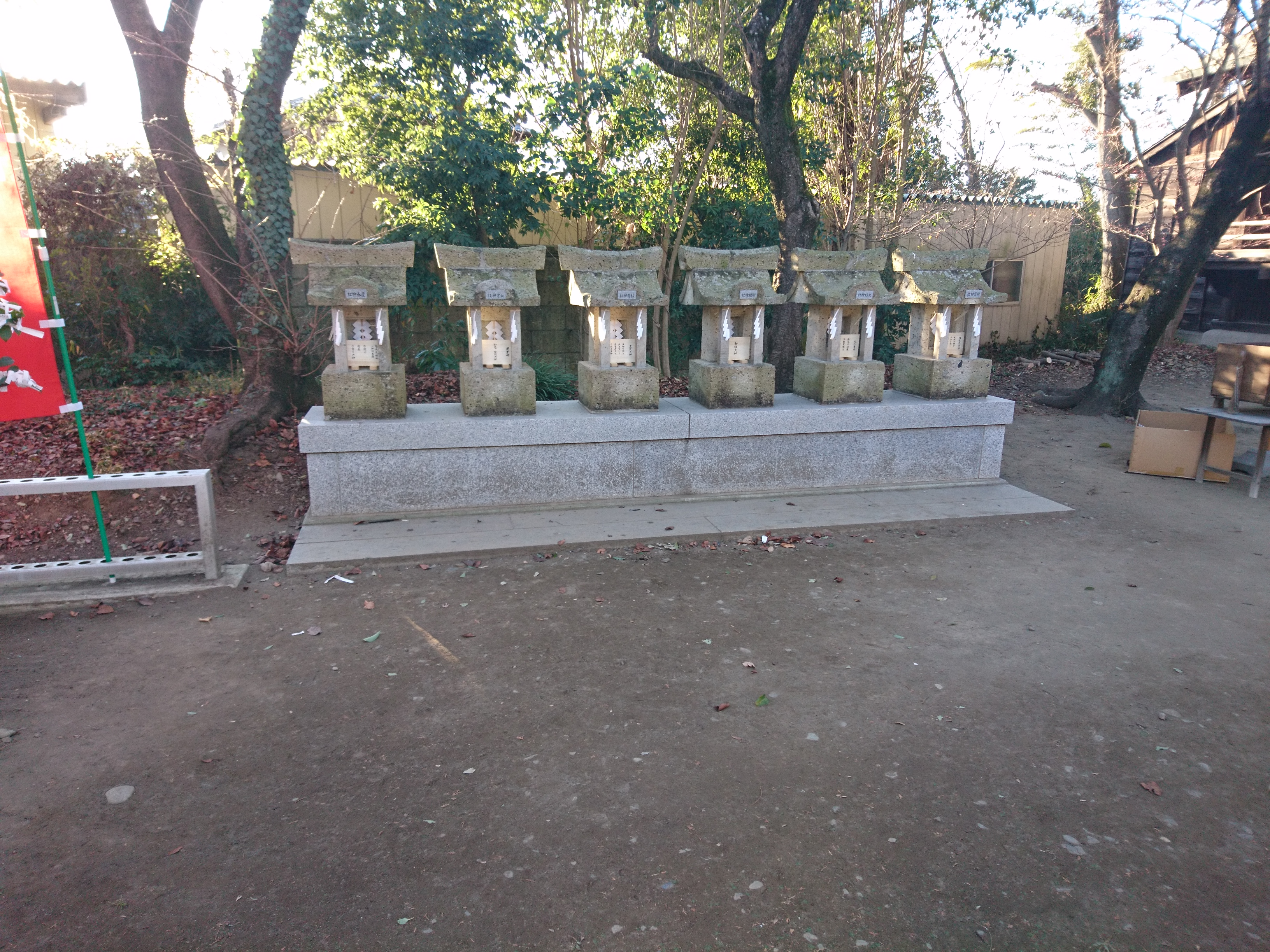 栃木県栃木市にある平柳星宮神社の境内社六社（須賀神社・大杉神社・御祖（みおや）神社・稲荷神社・血方神社・産泰（さんたい）神社）